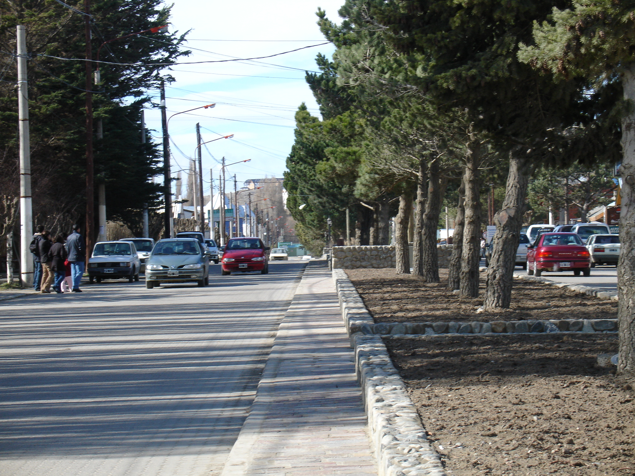 Vista de Av. del Libertador, la principal avenida de El Calafate.